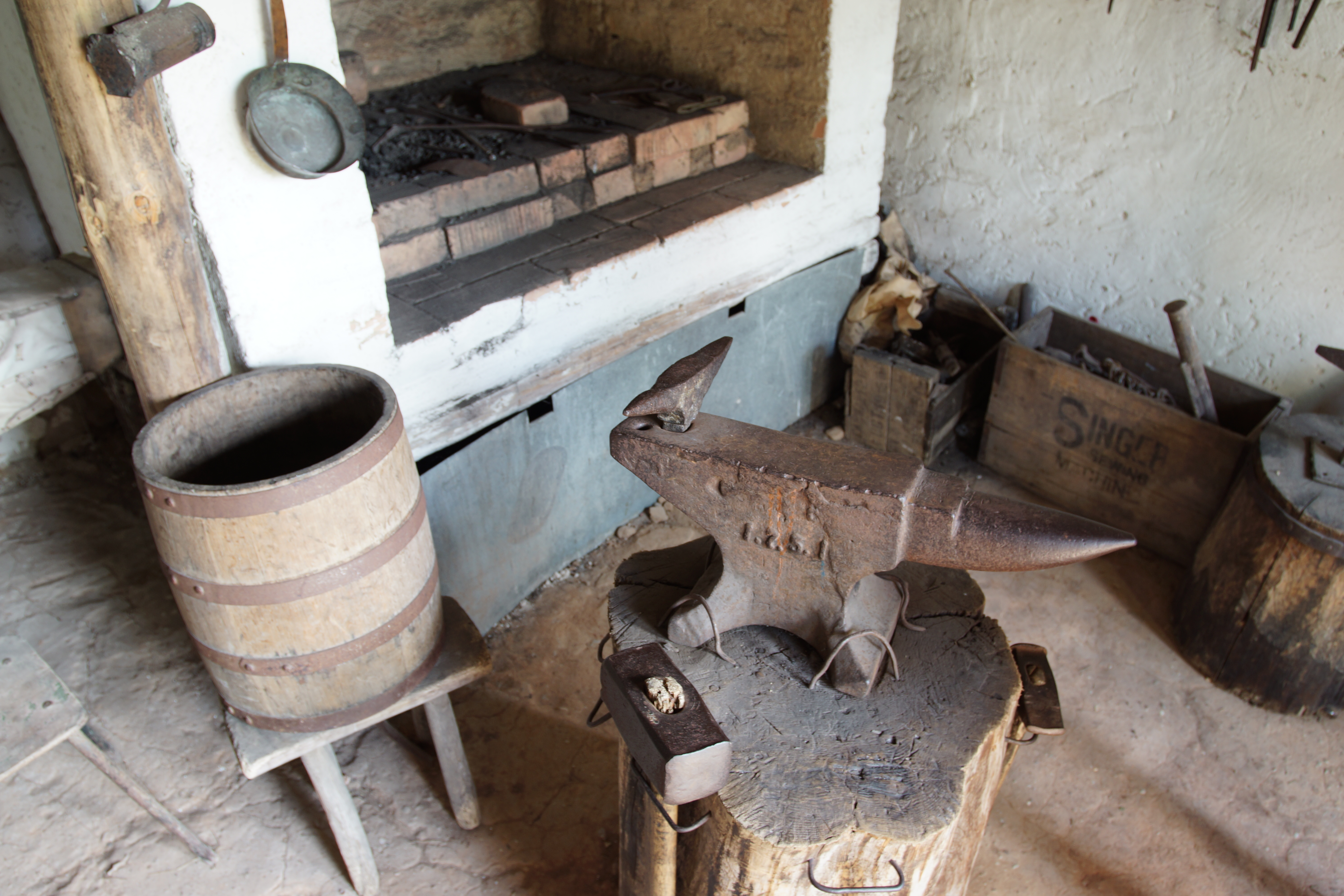 Беларуская (тарашкевіца): Музэефікаваныя аб’екты этнаграфічных комплексаў «Млын» і «Кузьня»:паравы млын дом завозьнікаў сьвіранкузьня. г. Заслаўе This is a photo of Belarusian heritage monument. Reference number: 612Г000334 ( WLM)